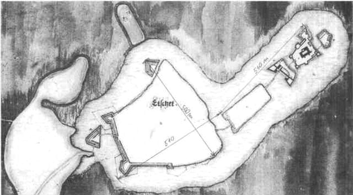 Natale Angielini rajza Ecsed (Etchet) várának felméréséről 1565 Kisari Balla György: Térképkincsek Stuttgartban - Kartenschätze in Stuttgart